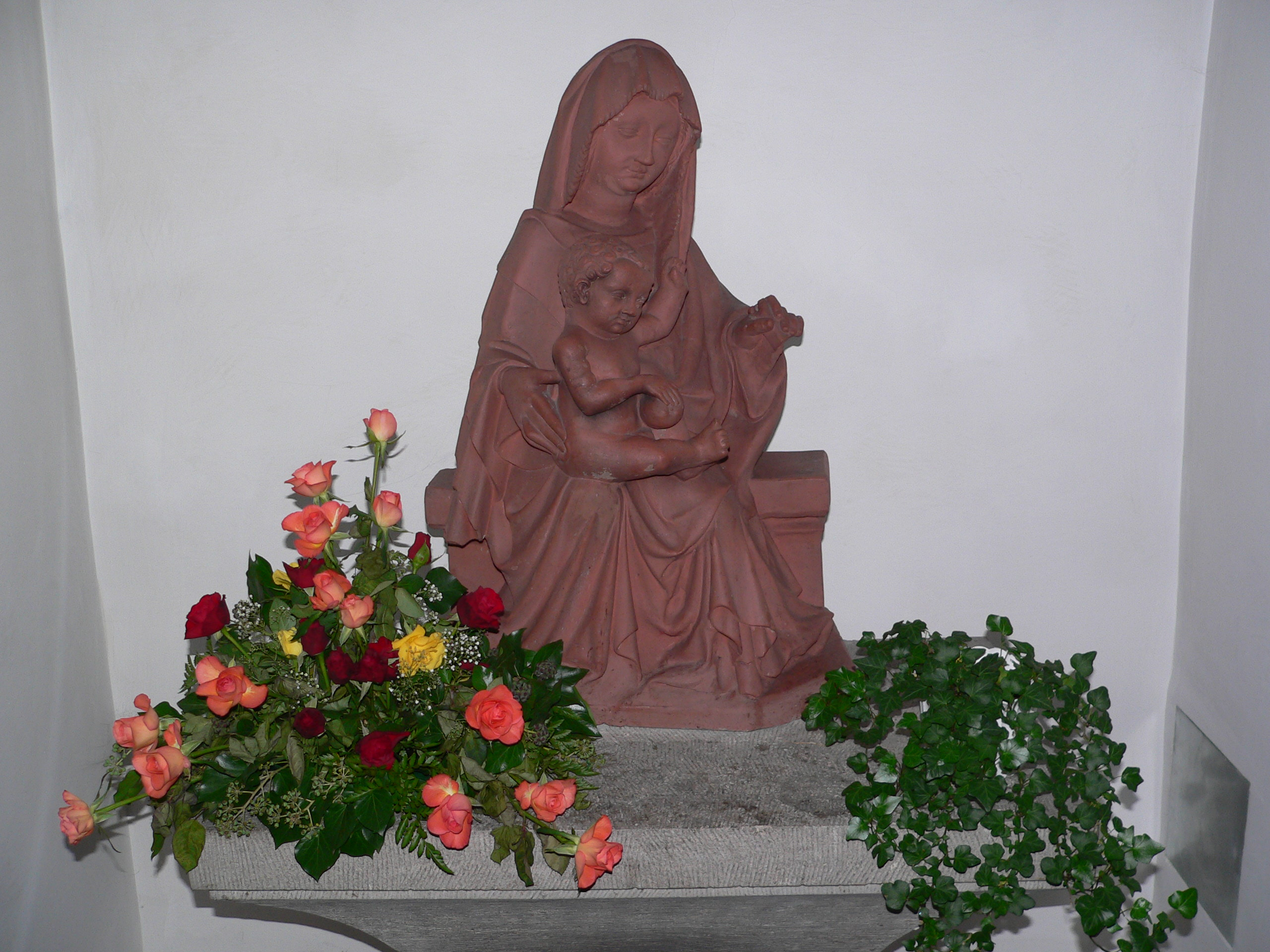 Sculpture Of The Madonna "Madonna vom Scheuerberg" in the Church "Klosterkirche", Neckarsulm